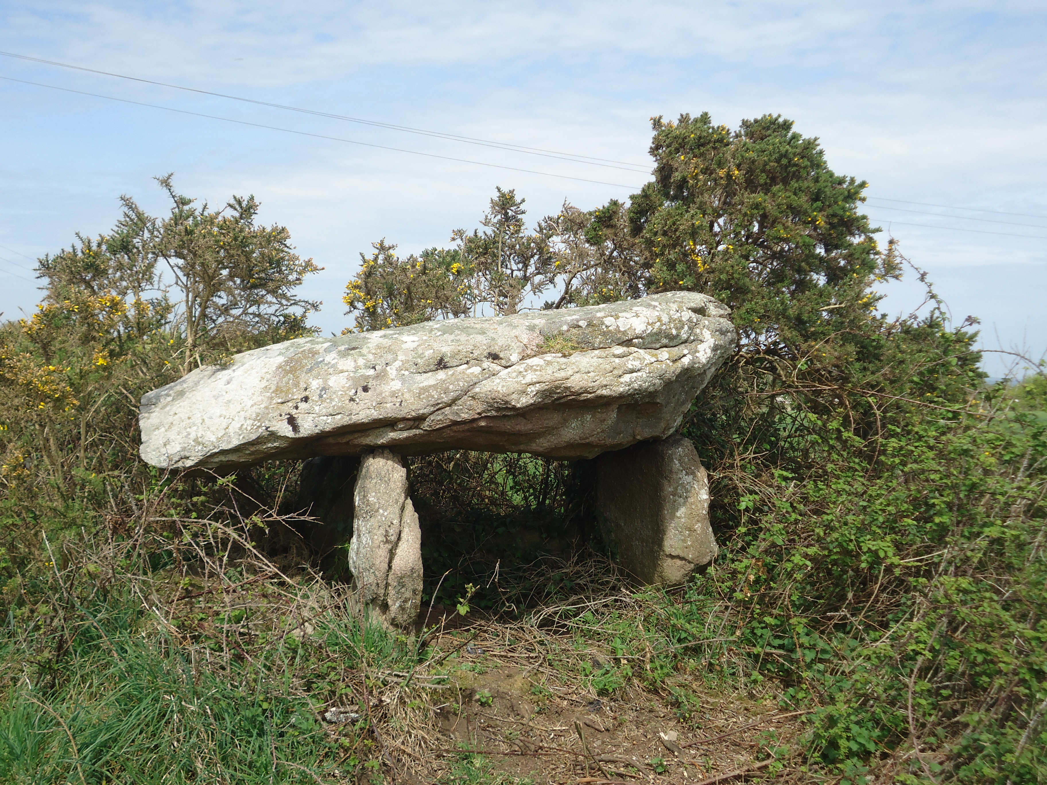 Dolmen de Kerclément à Belz dans le Morbihan